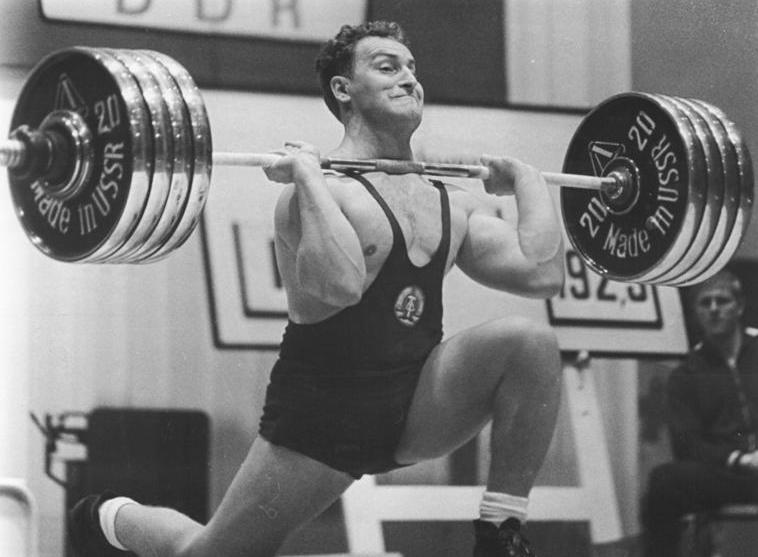 Dachwig, Manfred Rieger Zentralbild Studré 25.09.1967 Dachwig: Manfred Rieger stellte neuen Gewichtheberrekord auf. Einen neuen hervorragenden deutschen Gewichtheberrekord der DDR im Olympischen Dreikampf der Schwergewichtsklasse stellte Manfred Rieger (Motor Zittau-Archivfoto) am 23.09.1967 beim Verbandspokalturnier in Dachwig bei Erfurt auf. Mit 505,0 kg übertraf er als erster DDR-Gewichtheber die 500-Kilo-Grenze. Seine Einzelleistungen: Drücken 165 kg, Reißen 145 kg und Stoßen 195 kg (ebenfalls Rekord) .